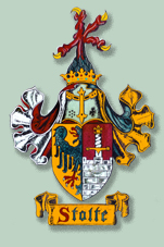 Dietrich Wilhelm Stolte (1770-1851) hat das bürgerliche Wappen zur Geburt seines Sohnes Karl August Heinrich Stolte (1822-1858) seinen direkten Nachfolgern gestiftet. Das Wappen wird seit 1822 bis heute im Siegelring getragen.Das Wappen zeigt links den Adler, der auch auf der Garnisonskriegsflagge der Garnison zu sehen war, die Dietrich Wilhelm Stolte in der Schlacht zu Waterloo befehligte. Neben der göttlichen Ewigkeit symbolisiert der Adler auch Mut und Stärke, Das Schwert rechts symbolisiert die militärische Stärke seiner Person. Die Krone über dem Helm im Wappen wurde als Zeichen der köngl.Genehmigung plaziert. Diese Krone ist die Gleiche, wie in seinem pers.Siegel, sowie auch in sein Amtssiegel das er aus der Hand König Georg IV.von Hannover unter Anderem für seine militärischen Leistungen bekam.